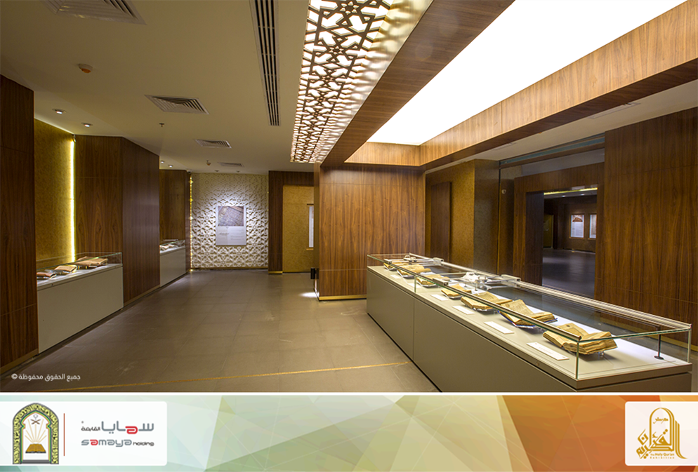 صورة من قاعة الجهود التاريخية للعناية بالقرآن الكريم " مكتبة الملك عبد العزيز"